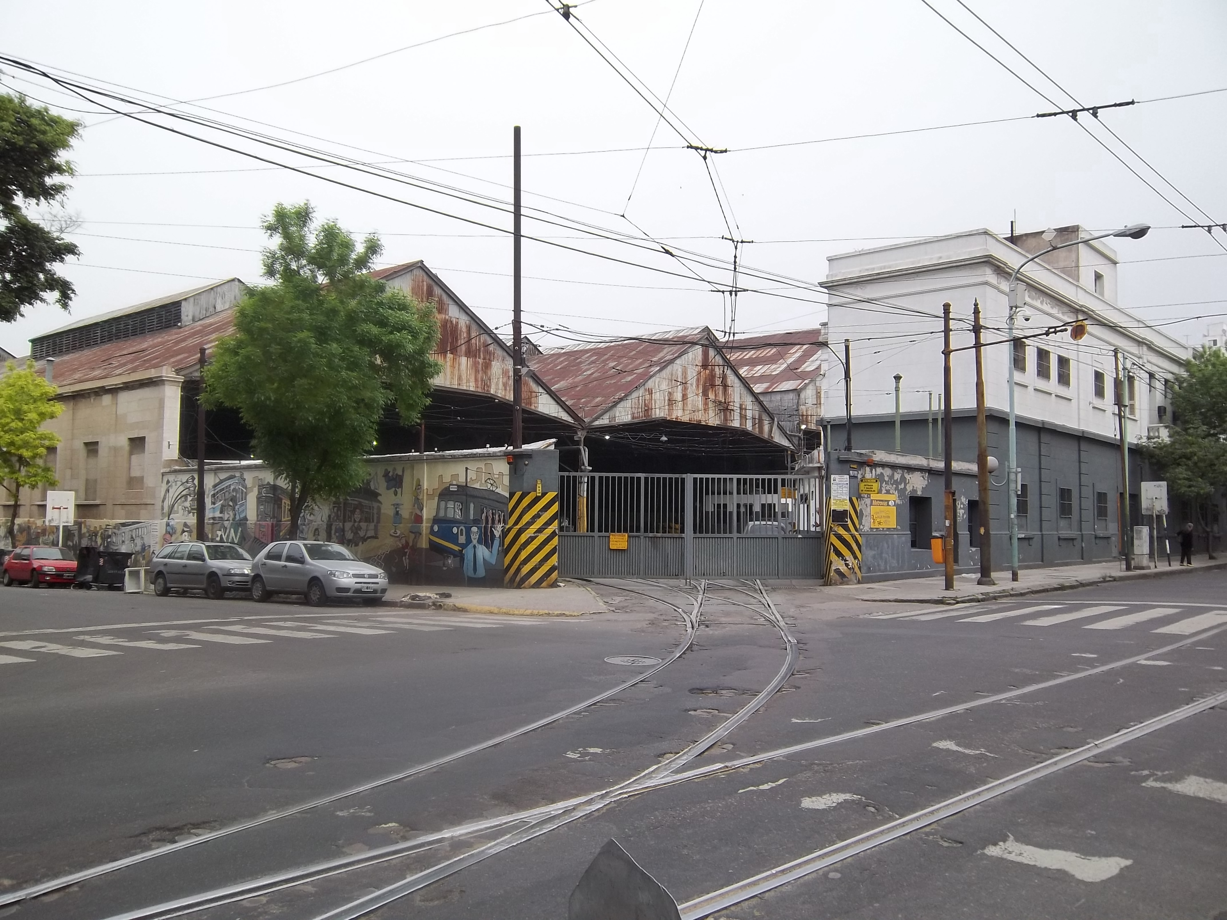 Entrada al Taller Polvorín del Subterráneo de Buenos Aires en el barrio de Caballito, Ciudad de Buenos Aires, Argentina.